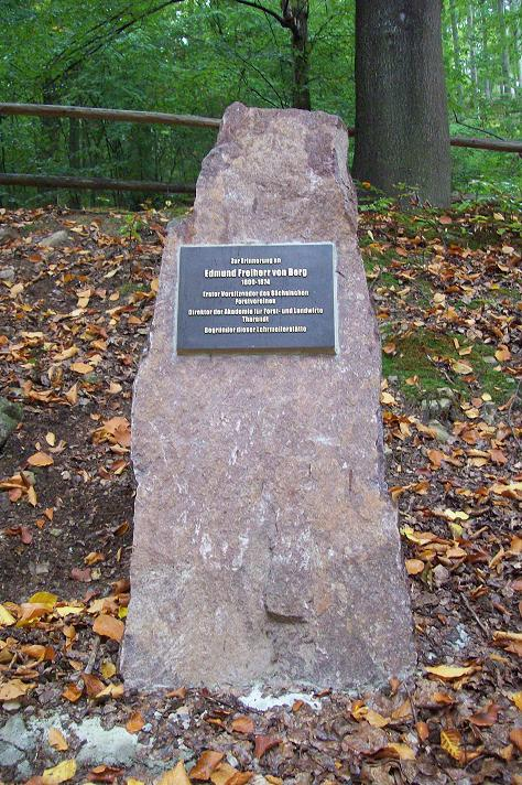 Gedenkstein Edmund von Berg Meilerplatz Tharandt